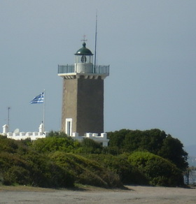 Ο Φάρος της Αρκίτσας